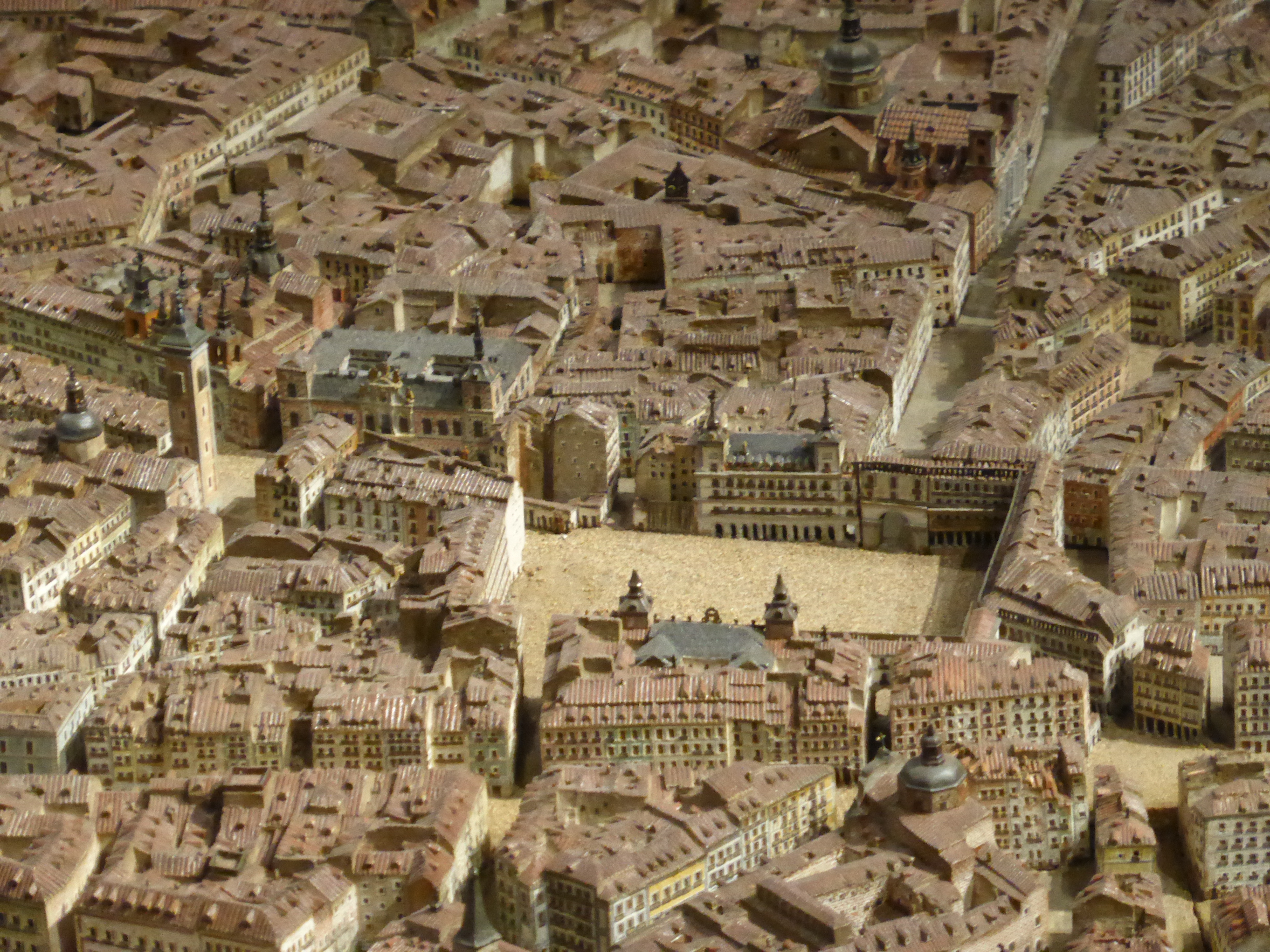 Representación de la Plaza Mayor de Madrid, y su entorno, en la gran maqueta conocida como "Modelo de Madrid", de León Gil de Palacio. Esta maqueta se empezó en el año 1828 y se terminó en 1830. Además de las construcciones de la Plaza Mayor (tal como se encontraban entonces), también puede verse -a la izquierda- la gran torre de la antigua iglesia de Santa Cruz (derribada en 1869). O la calle de Toledo (arriba, a la derecha), con la Colegiata de San Isidro (iglesia del antiguo Colegio Imperial de la Compañía de Jesús), con sus dos torres sin rematar. O la manzana del primer Monasterio de la Concepción Jerónima.